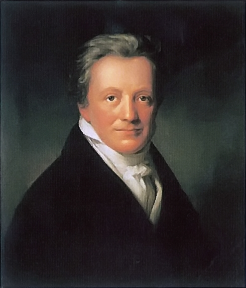 Salomon Heine (Salomon Heine), Heinrich Heine's uncle